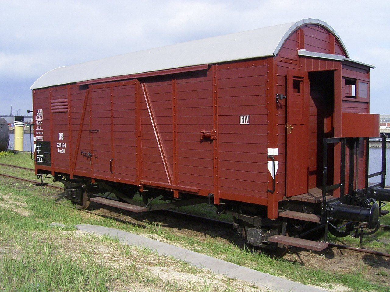 Güterwagen der Deutschen Reichsbahn, Bauart "Oppeln", gebaut zwischen 1938 und 1942, heute im Besitz der "Freunde der historischen Hafenbahn e.V." und aufgestellt am Bremer Kai in Kleiner Grasbrook